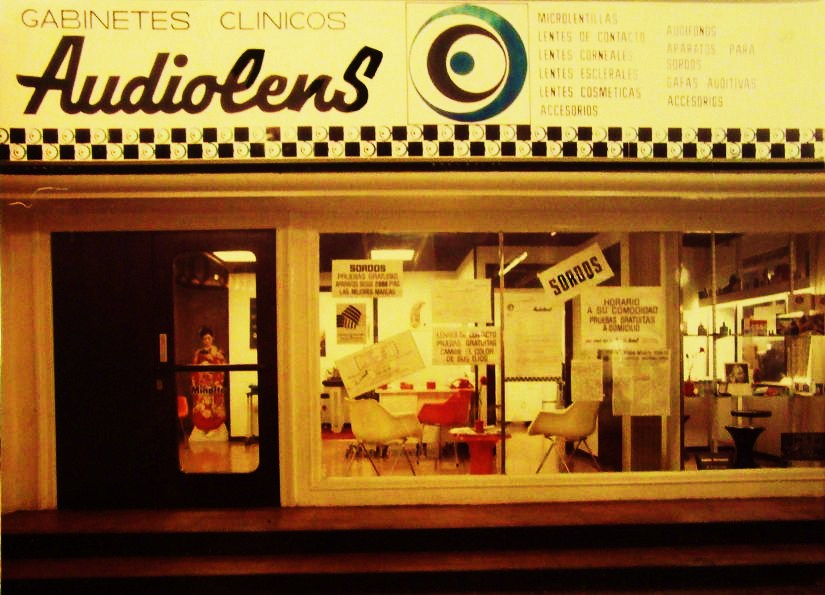 L'Òptica Audiolens, als números 40-42. L'Avinguda de la Llum era una galeria comercial subterrània de Barcelona ubicada sota el carrer de Pelai